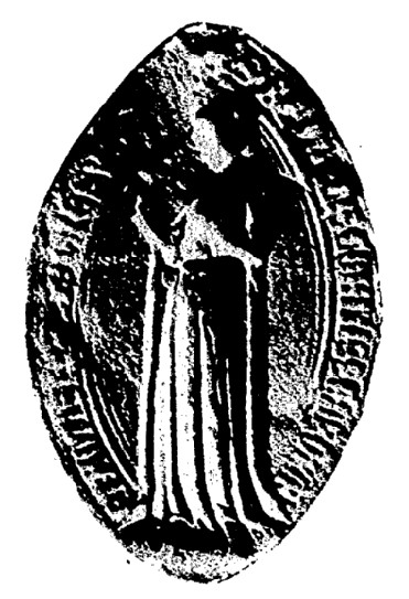 Béatrice de Montfort (1311)